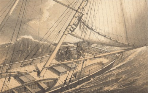 Lithographie von der Maria-Expedition 1854 zu den Färöern